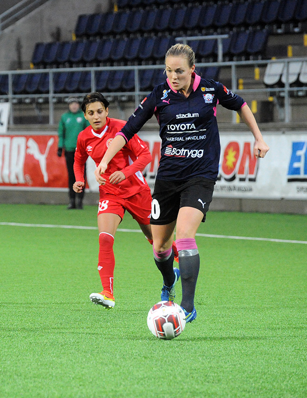 a_44_0310